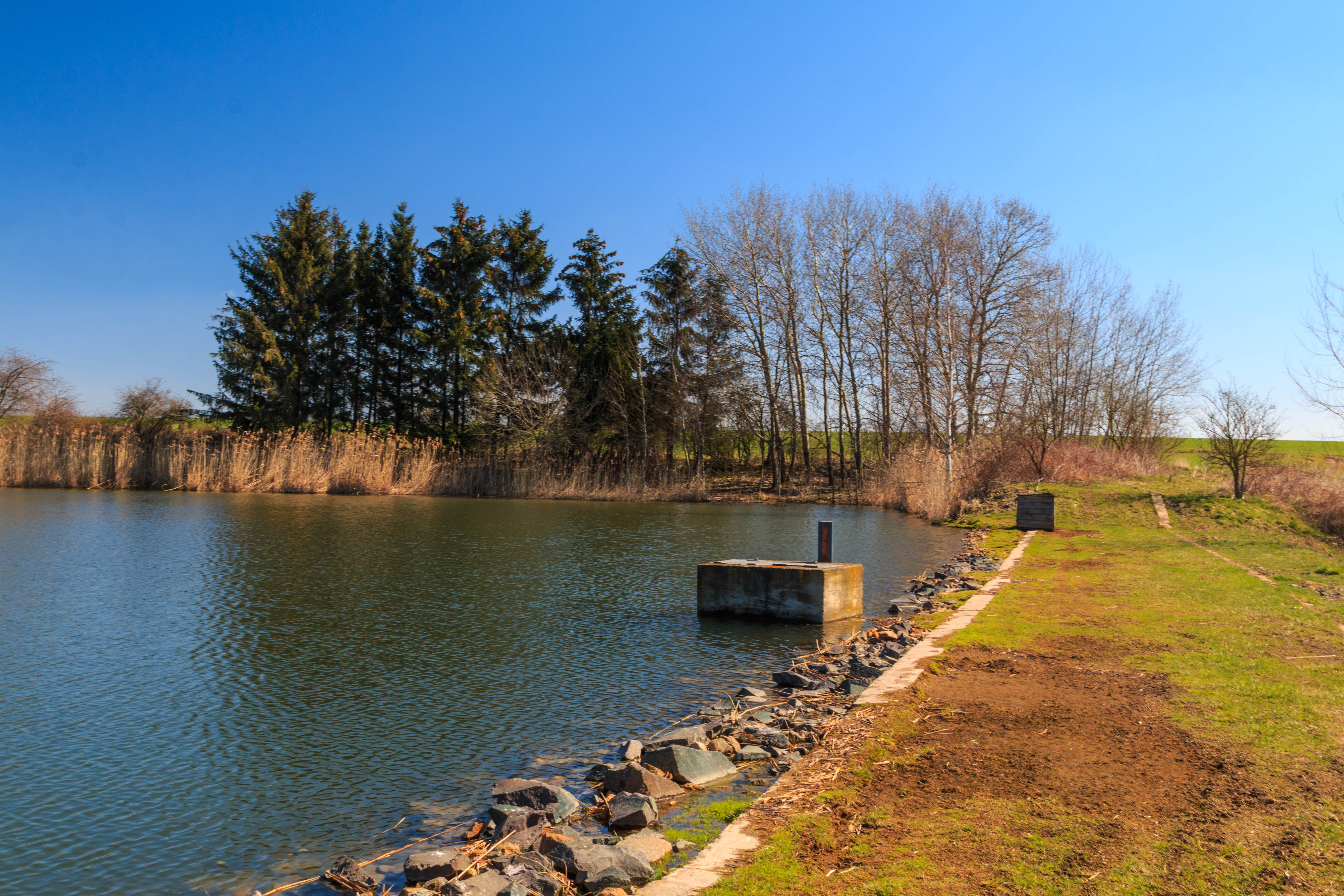 rybník Rožka u obce Kosice v okrese Hradec Králové Project: Vodstvo.